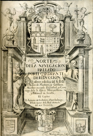 Grabado de Matías de Arteaga al frente del Norte de la navegacion hallado por el quadrante de reducción de Antonio de Gaztañeta.